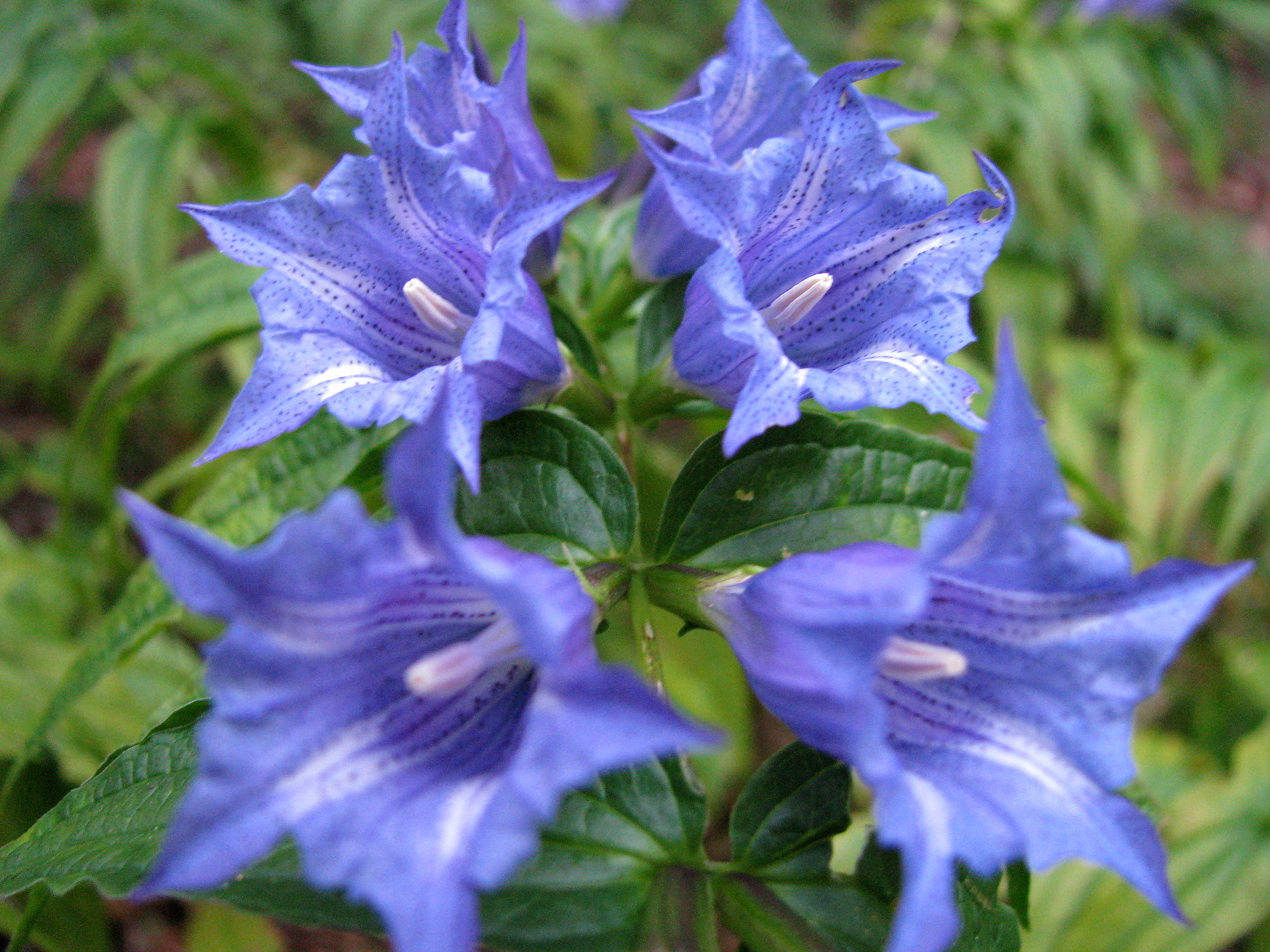 Svečnik (Gentiana asclepiadea)